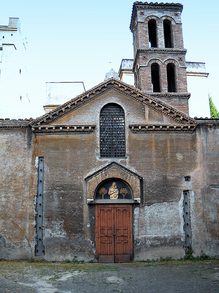 Chiesa di Santa Maria in Cappella in Roma, rione Trastevere